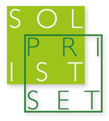 Solistprisets logotyp med 2014 års gröna färger